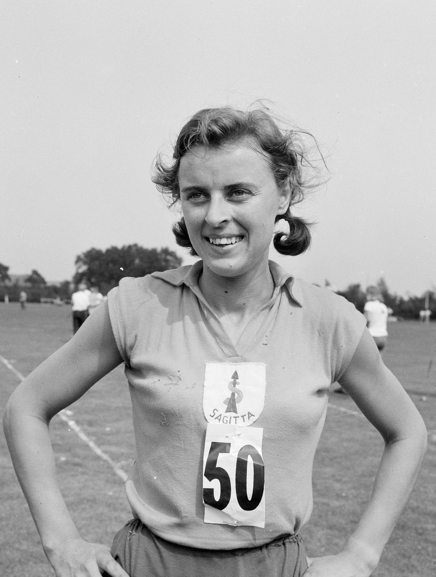 Damesdubbel kampioenschappen atletiek te Apeldoorn, Tilly van der Zwaard (800 meter)